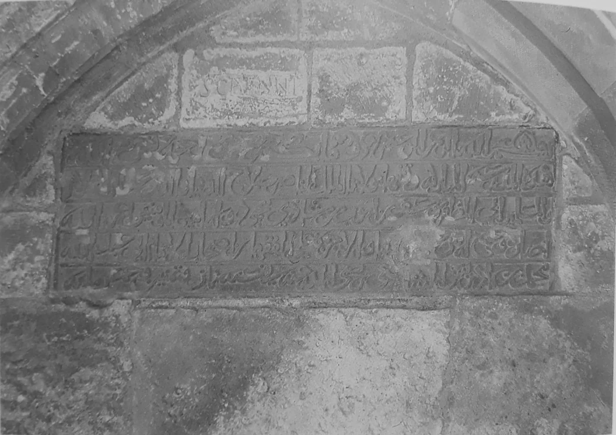 المدرسة الصلاحية هي مدرسة أنشأها صلاح الدين الأيوبي في بيت المقدس سنة 588هـ - 1192م